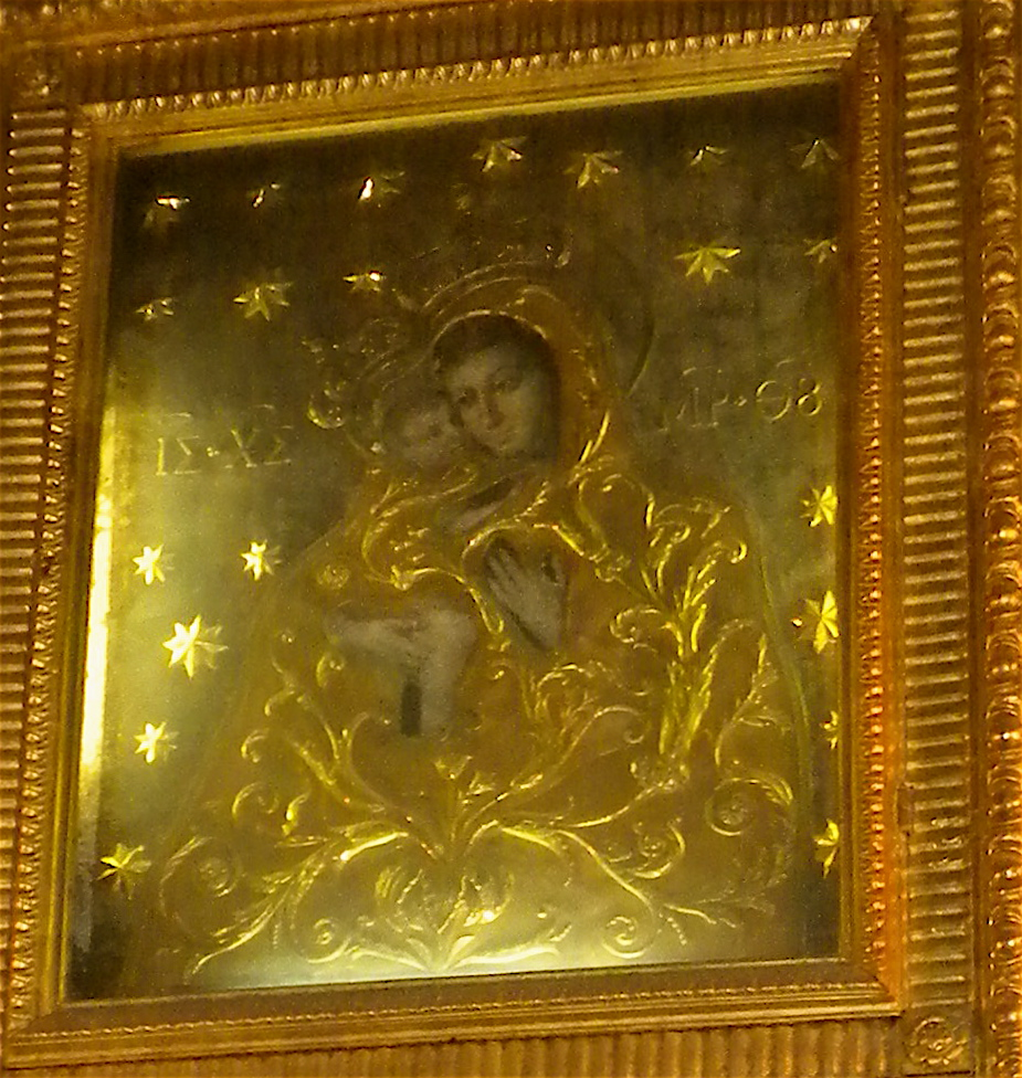 Madonna del Pascolo, Ss. Sergio e Bacco, Rome